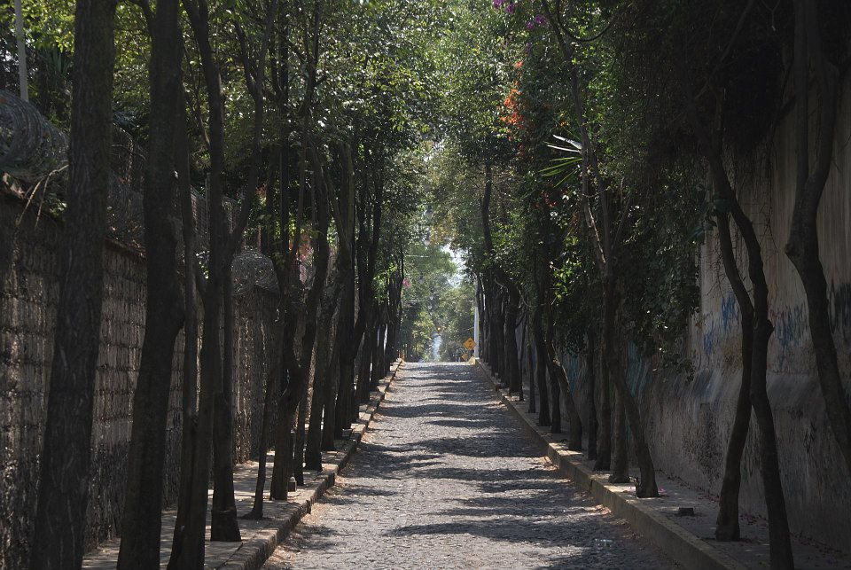 Callejones del Centro Historico de Tlalpan